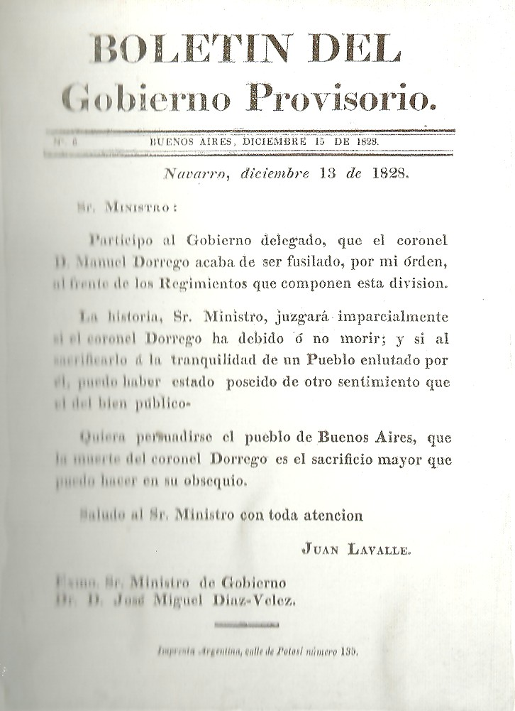 Boletín de Lavalle informando sobre el fusilamiento de Manuel Dorrego